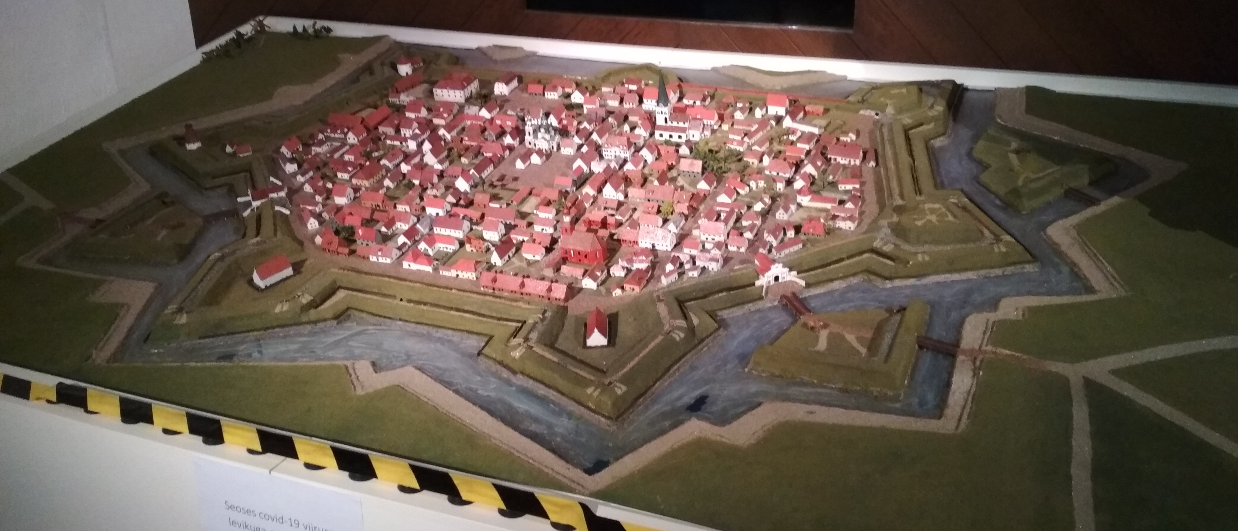 Pärnu kindluslinna makett (Pärnu Muuseum)